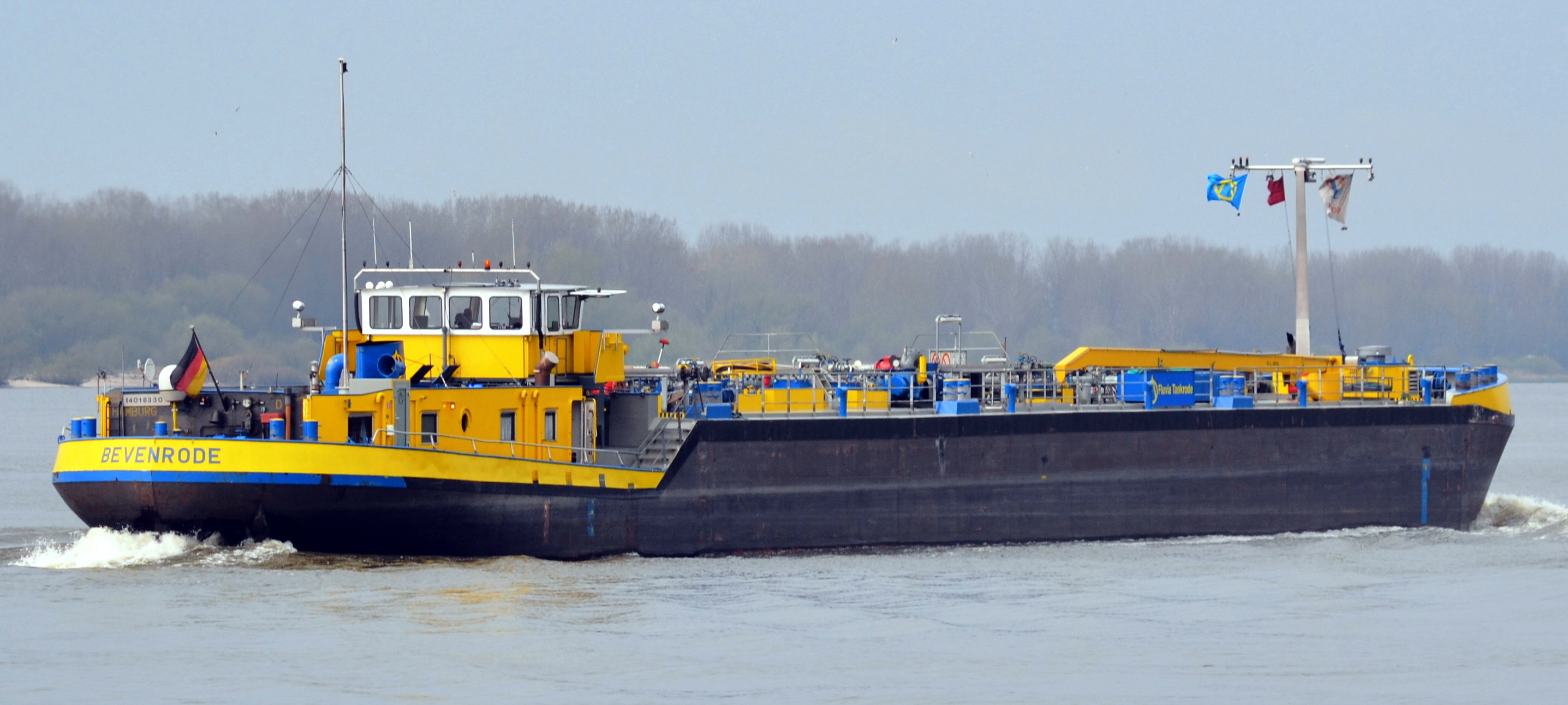 Das Frachtschiff Bevenrode auf der Elbe in Hamburg.